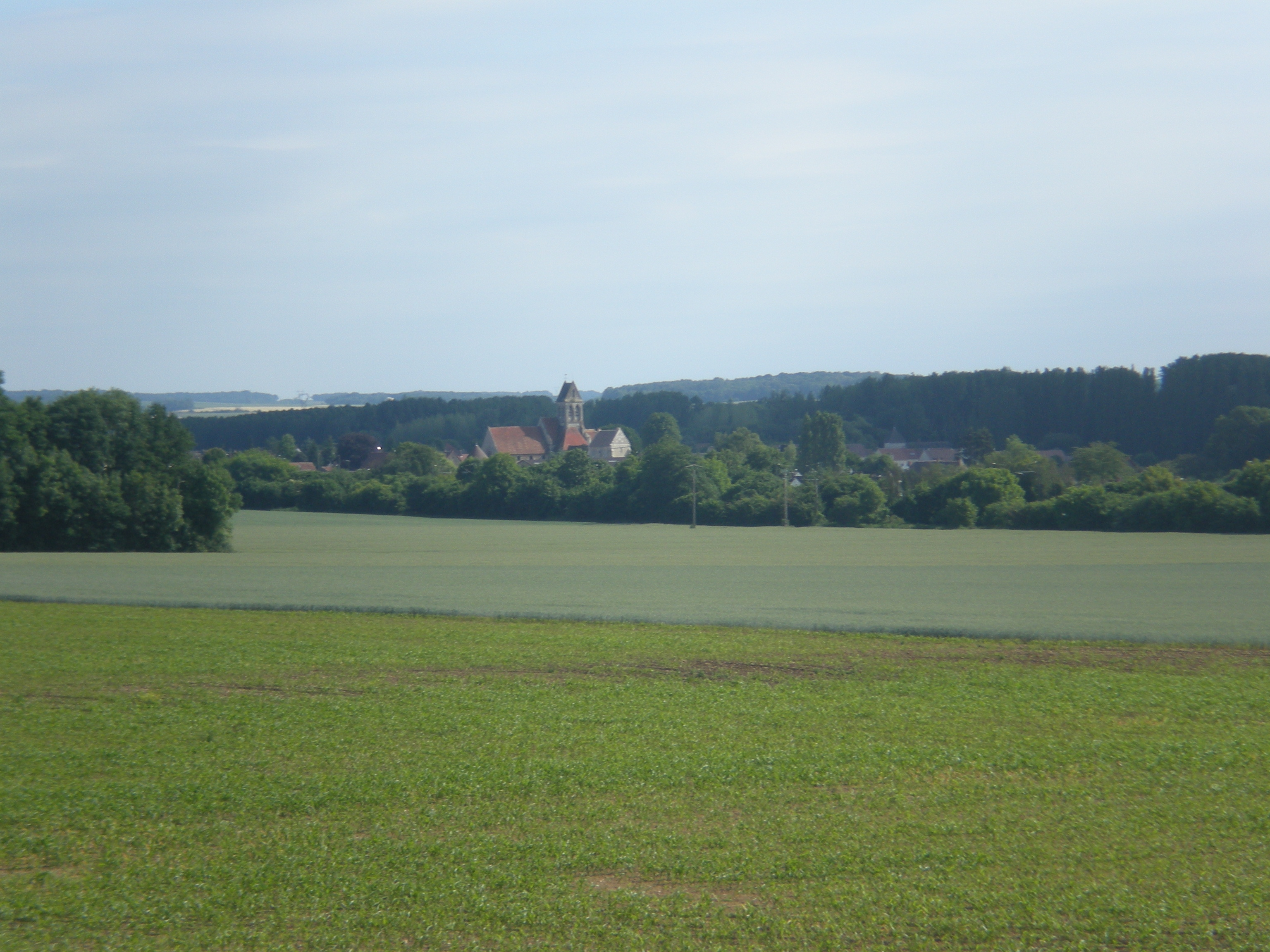 vue sur Breuil-le-Vert depuis la commune de Neuilly-sous-Clermont (Oise)